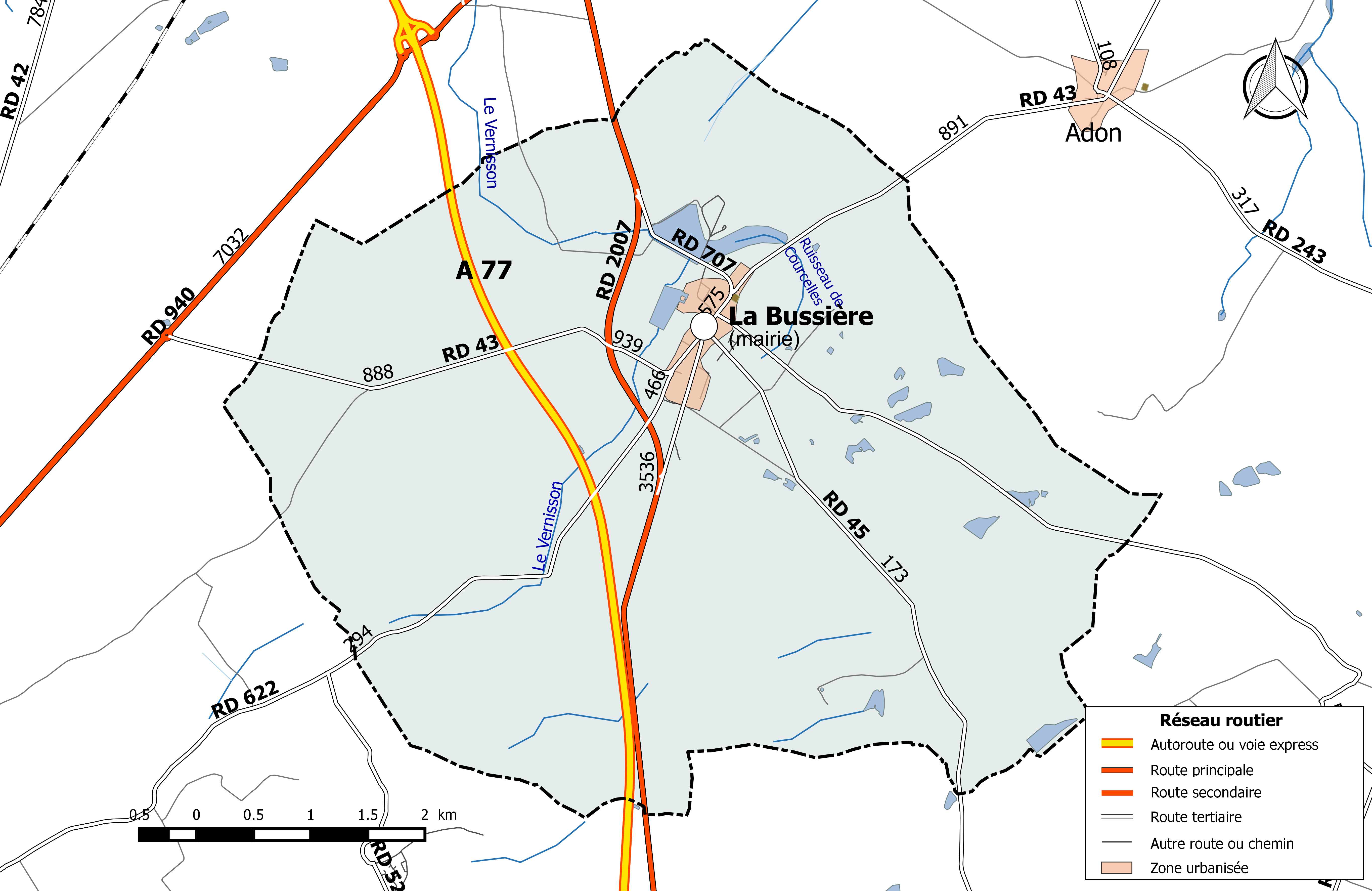 Carte du réseau routier de la commune de La Bussière (Loiret).